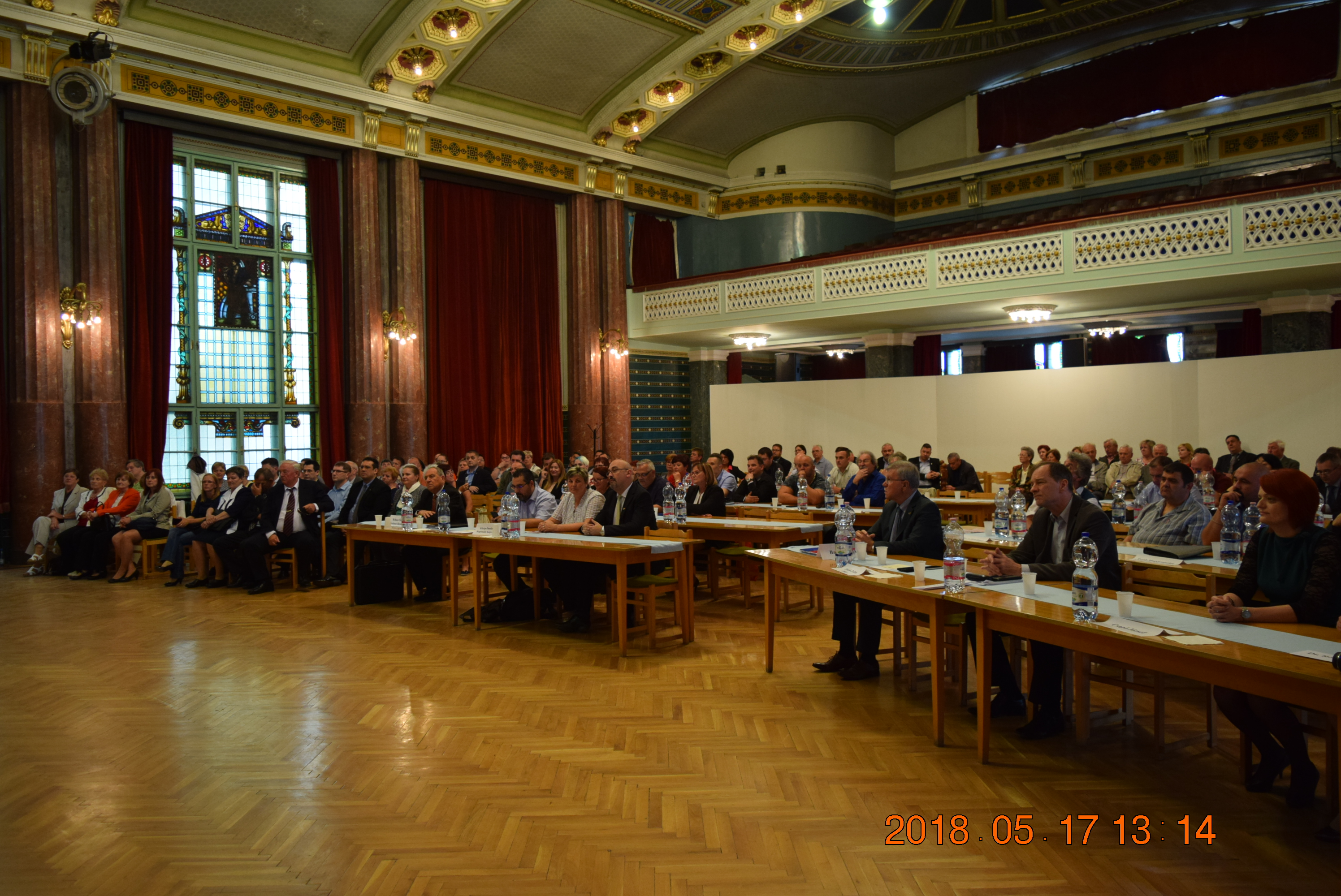 A díszterem kongresszus közben.